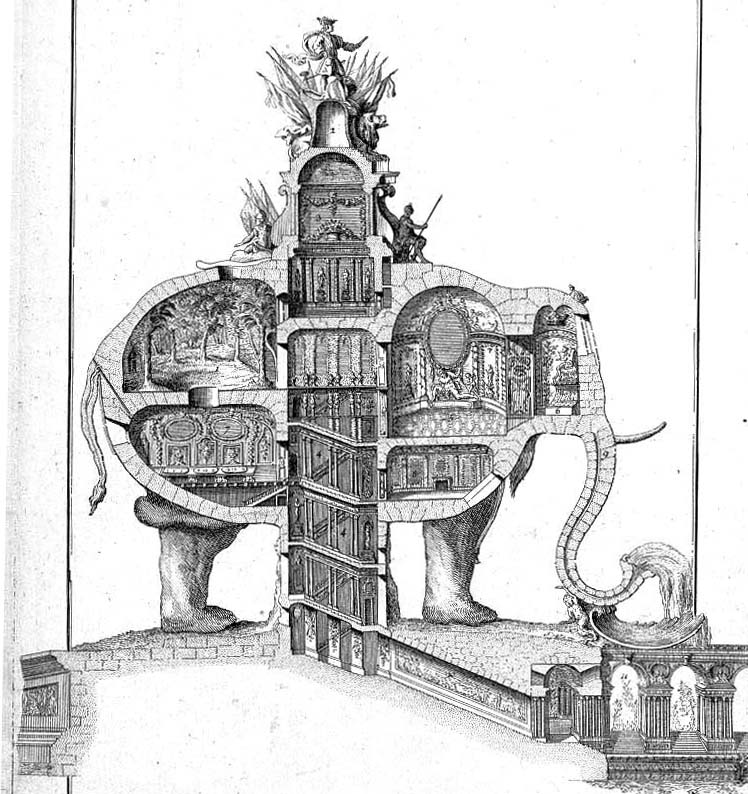 "Profil de l’Édifice sur la Longueur" by Charles-François Ribart, in Architecture Singulière. L'éléphant triomphal. Grand kiosque a la gloire du roi, Paris: P. Patte, 1758